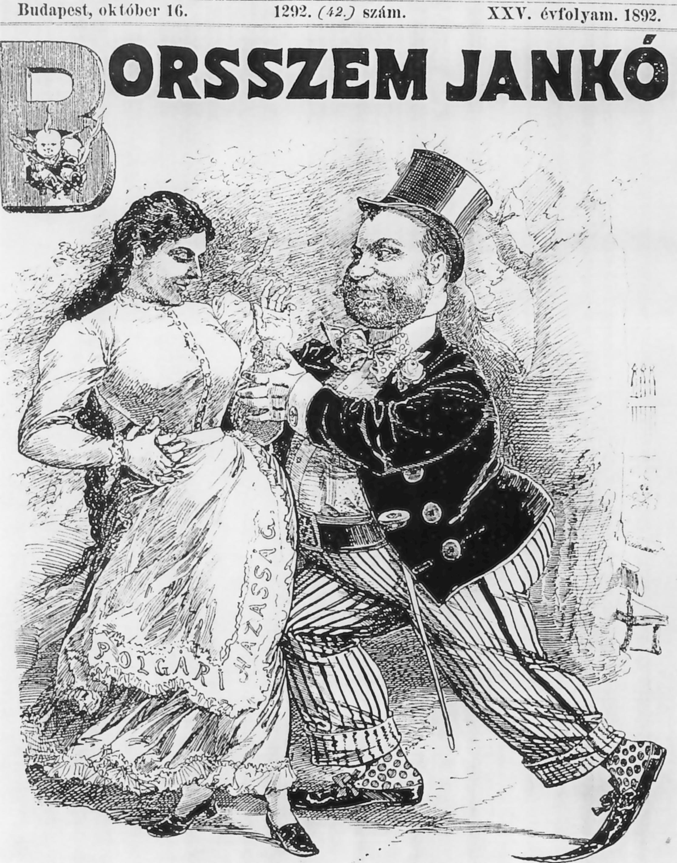 Forrás: Borsszem Jankó, 1892. október 16. Az eredeti kép alatt felirat olvasható: "SZ. D. - Ide hozzám galambom, legyen az enyém! Plg. H. - Ugyan maradhasson a kegyelmes ur. Ugy is tudom, hogy csak mókázik velem!"